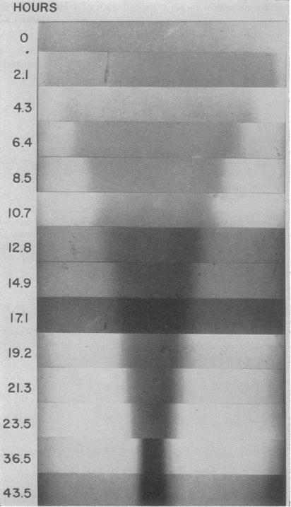 Lahuse tsentrifuugimisel DNA koondumine tasakaalulisse punkti